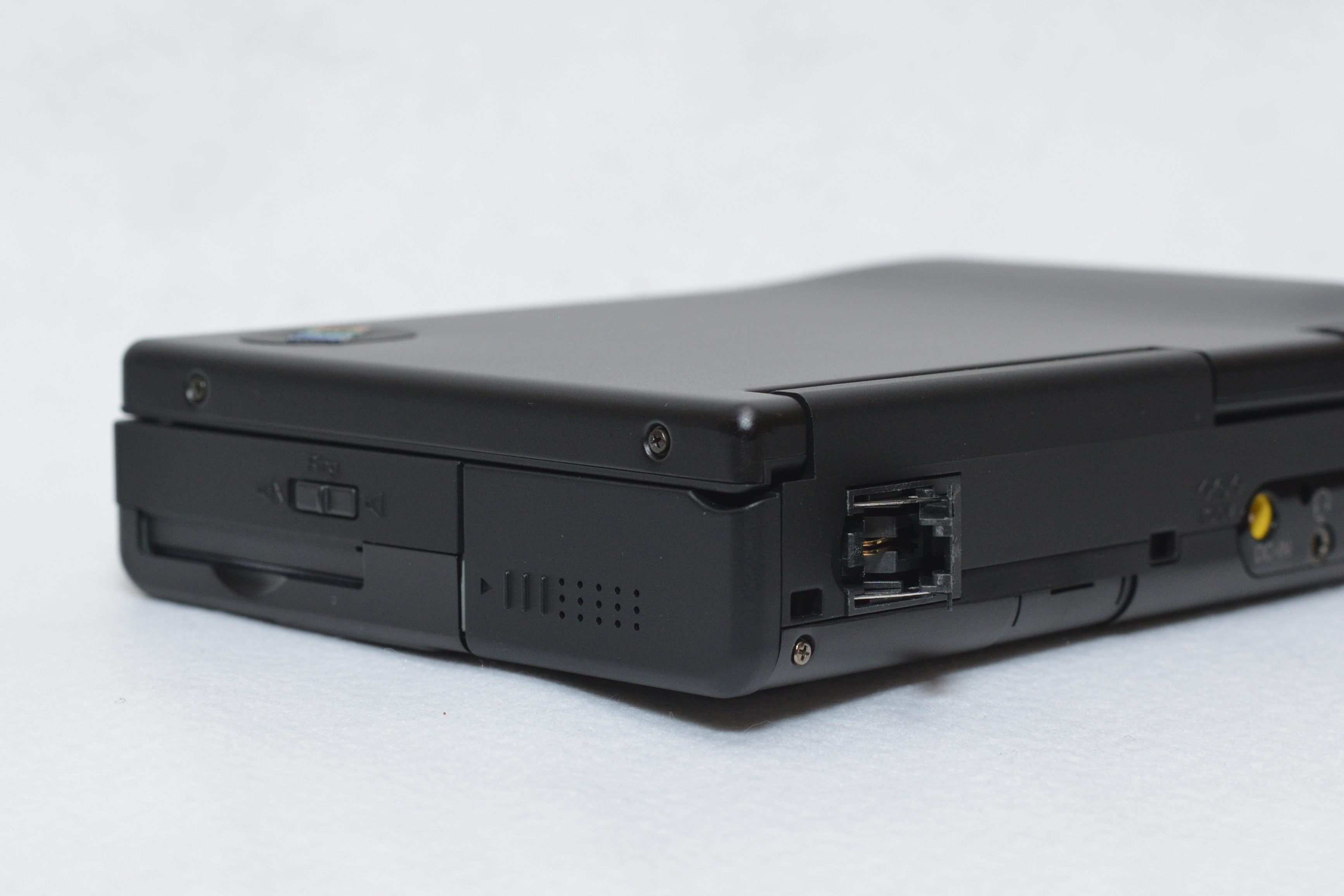 IBM Palm Top PC 110 wing jack（ウィングジャック、電話入力端子）